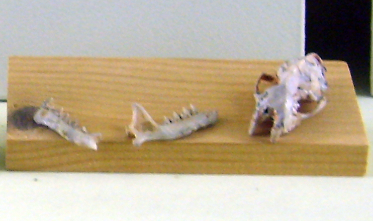 Pseudorhinolophus antiquus skull and lower jaw at the Museum für Naturkunde, Berlin.